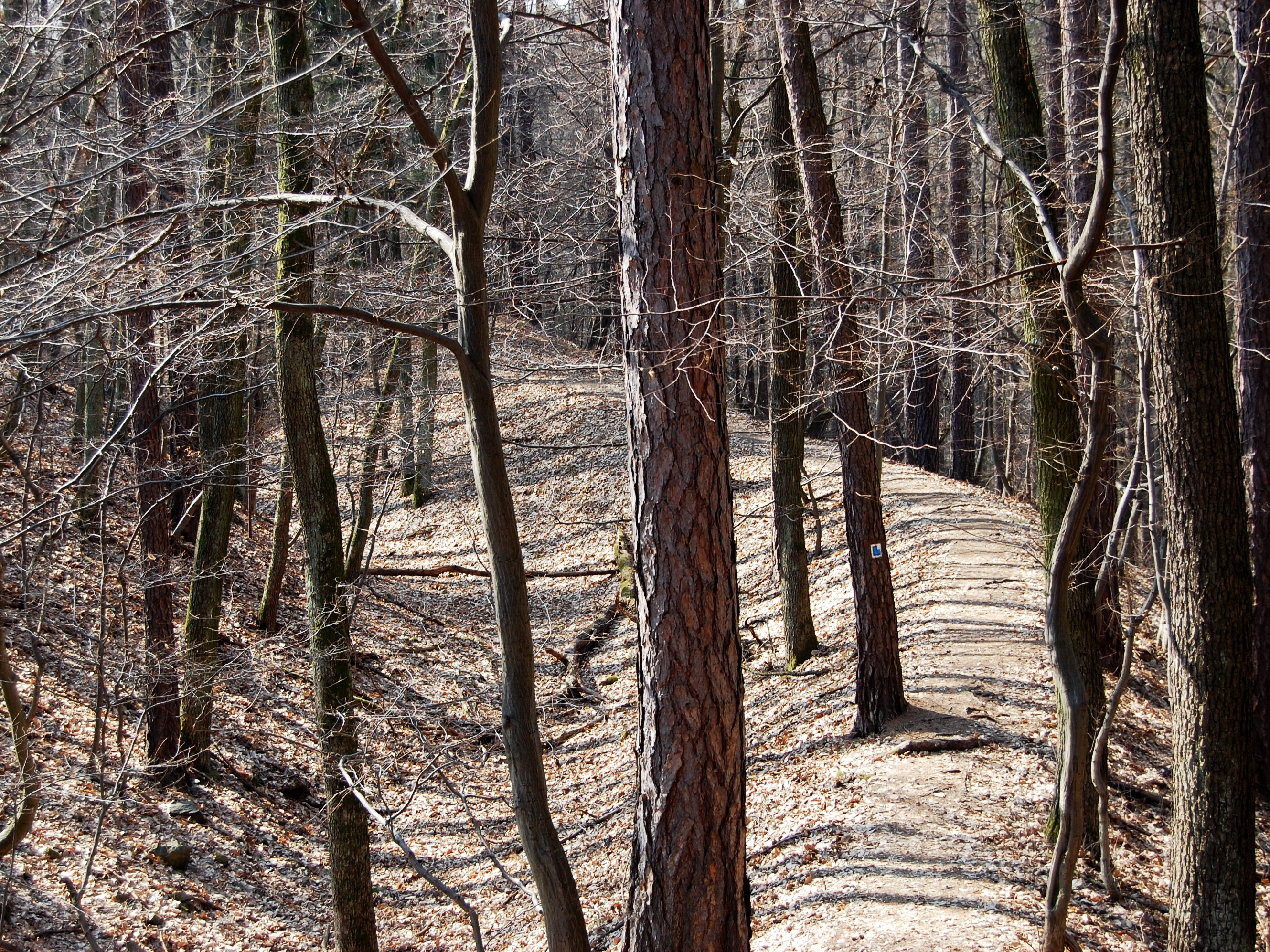 Hrad Vildenberk, zřícenina (Pozořice), SV od obce, Pozořice